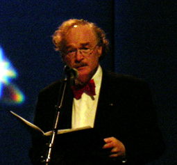 Norwegian writer Knut Ødegård.